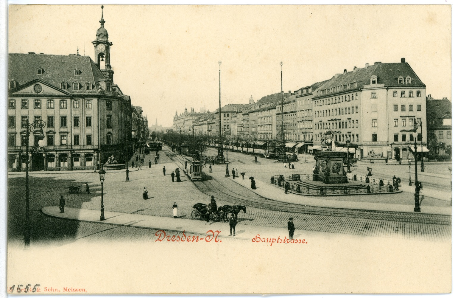 Dresden N.; Hauptstraße This postcard is from publisher Brück & Sohn in Meißen ( postcard has a unique number 01555 and is available in a higher resolution at the publisher. This images was uploaded in a cooperation project between Wikipedians and the publisher.